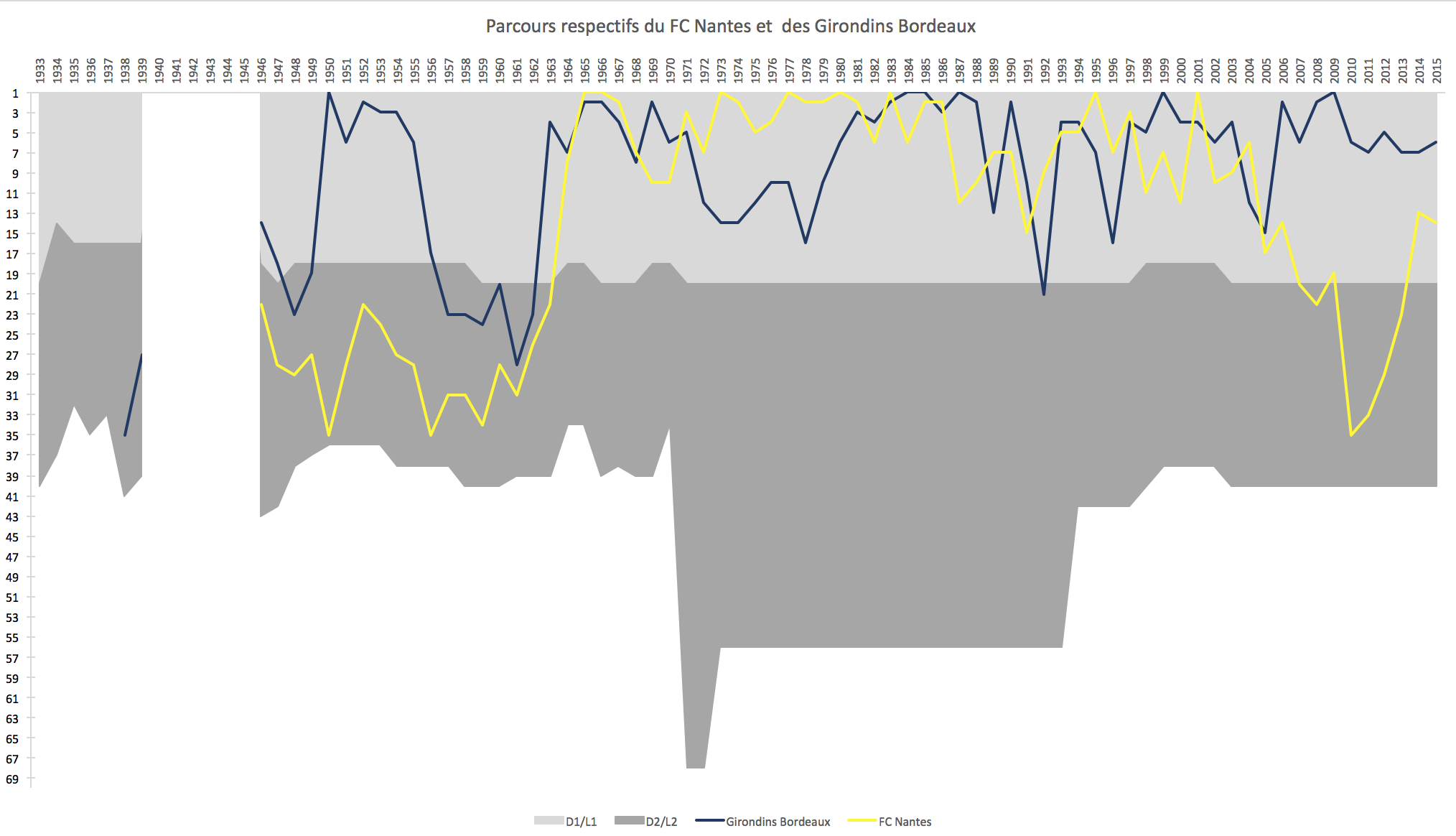 Classements comparés du FC Nantes et des Girondins Bordeaux depuis 1932/1933